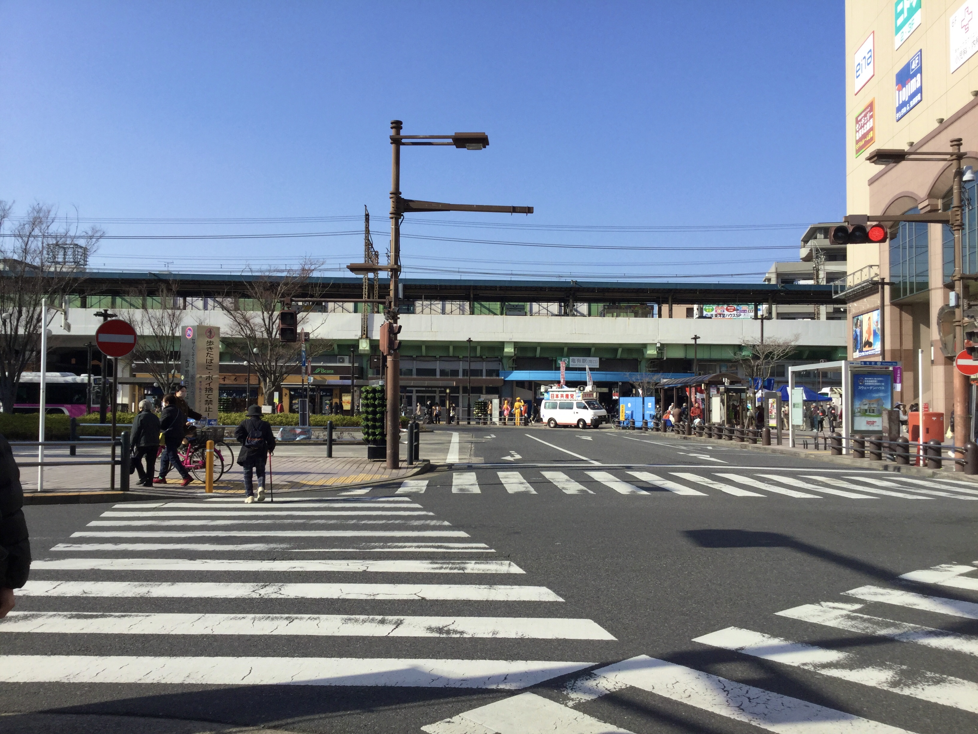 亀有駅南口